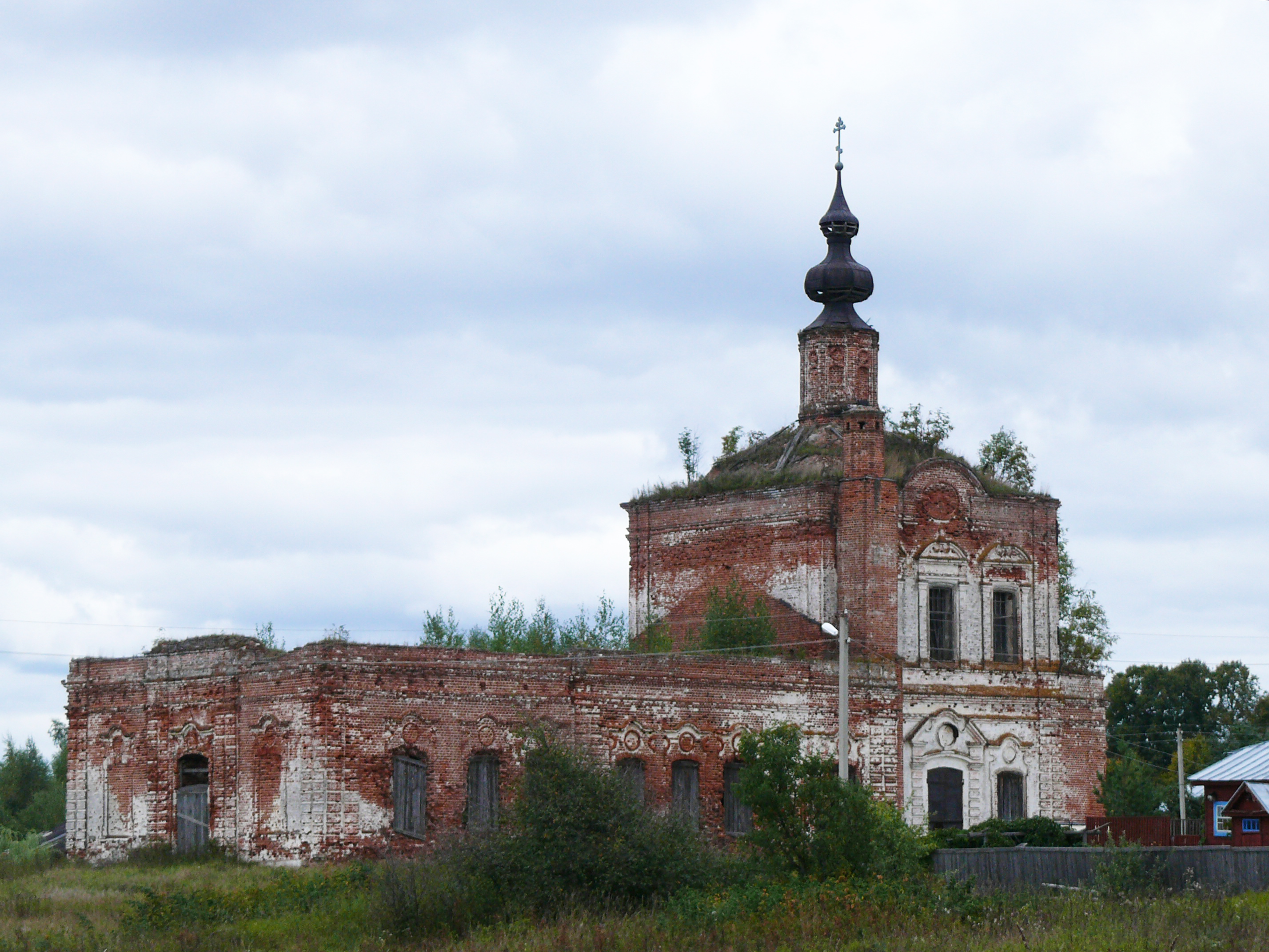 Церковь Пресвятой Троицы: Ряхово, Камешковский район, Владимирская область